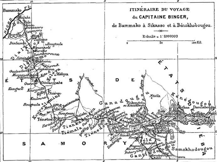 "Itinéraire du voyage du capitaine Binger, de Bammako à Sikasso et à Bénokhobougou", in Du Niger au golfe de Guinée (Louis-Gustave Binger), reproduit dans Le Tour du Monde, 1891, premier semestre, tome XI, p. 34